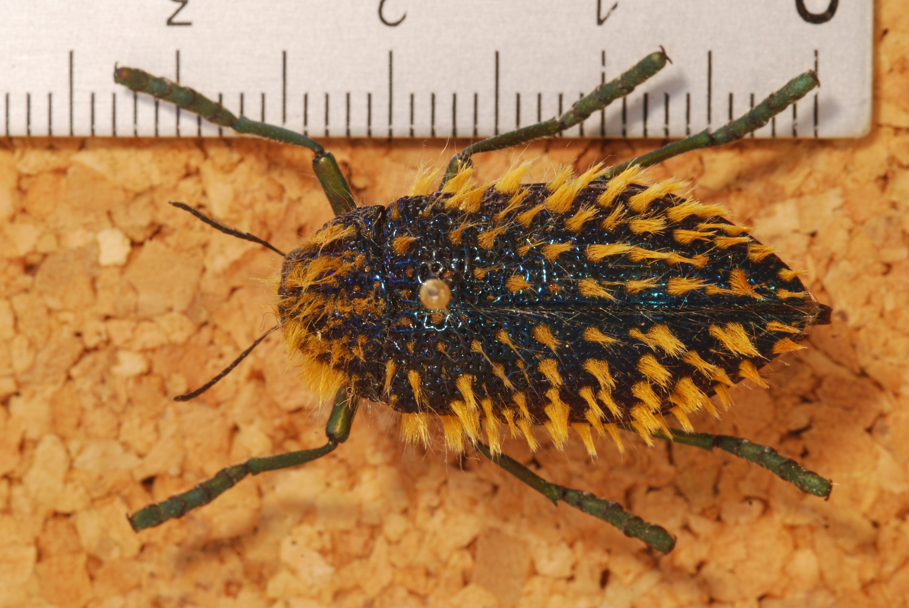 Bitterfontein, Western Cape, SOUTH AFRICA